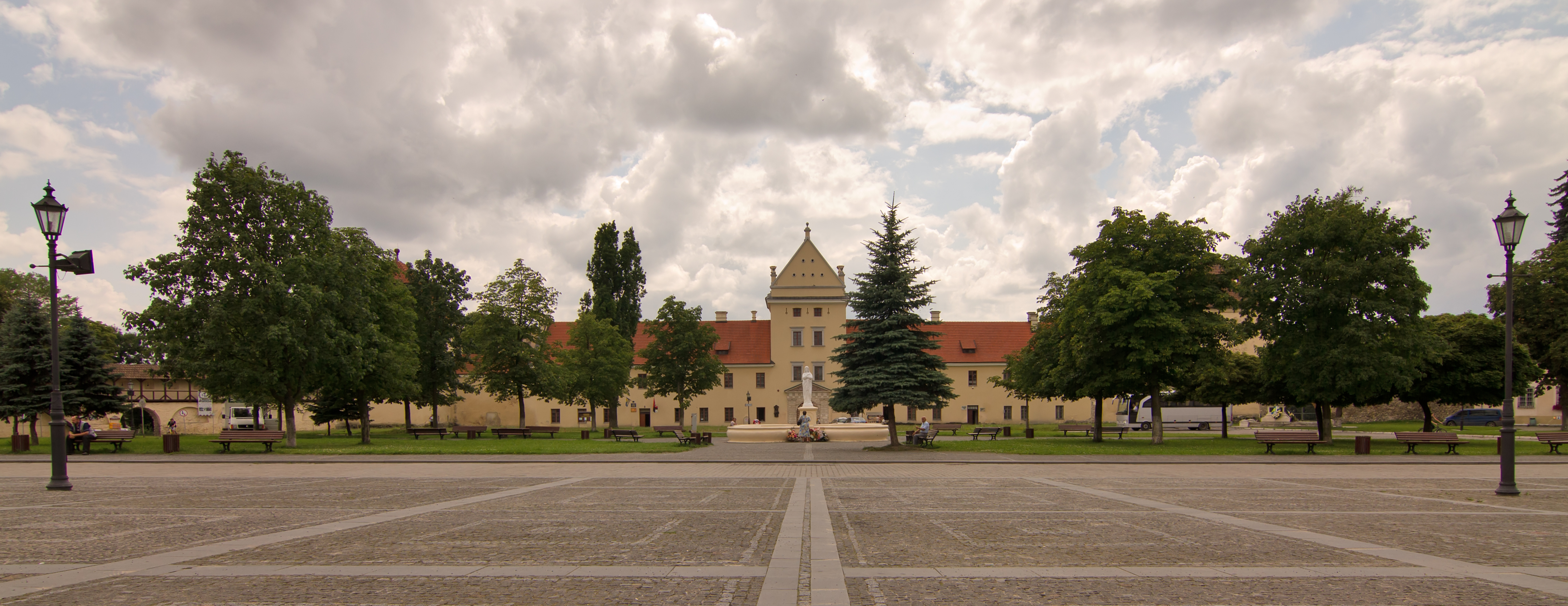 Замок Жолкевських(мур.), Жовква, пл.Вічева, 2